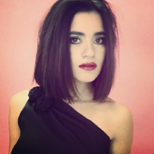 Acrtiz mexicana